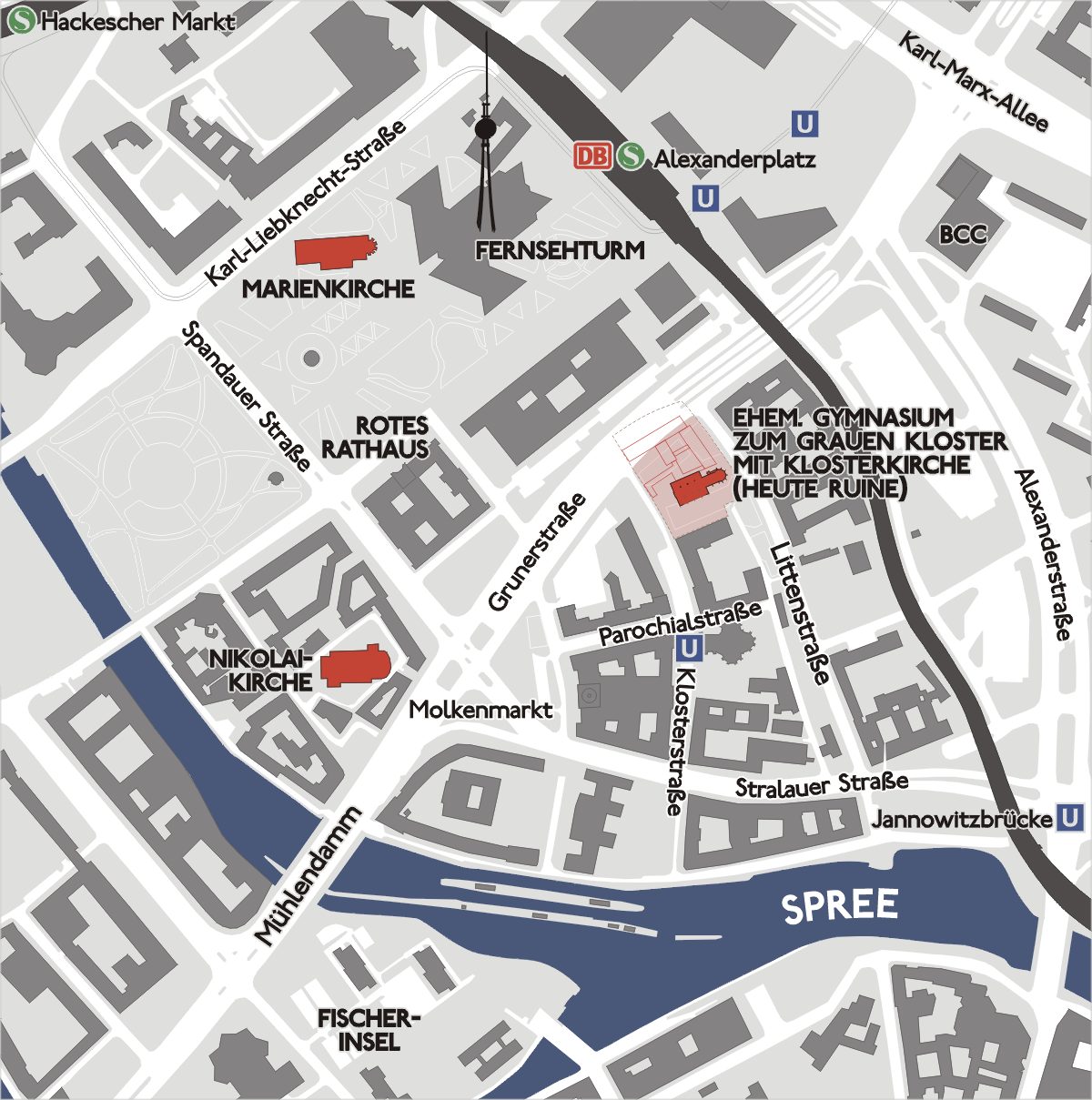 Lage des ehemaligen Gymnasiums zum Grauen Kloster in Berlin